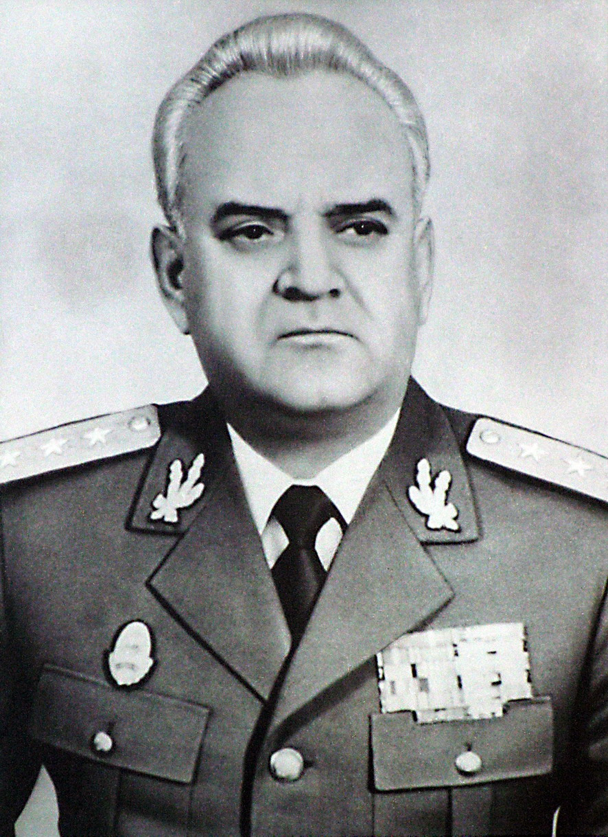 Ministrul apărării, Vasile Milea.